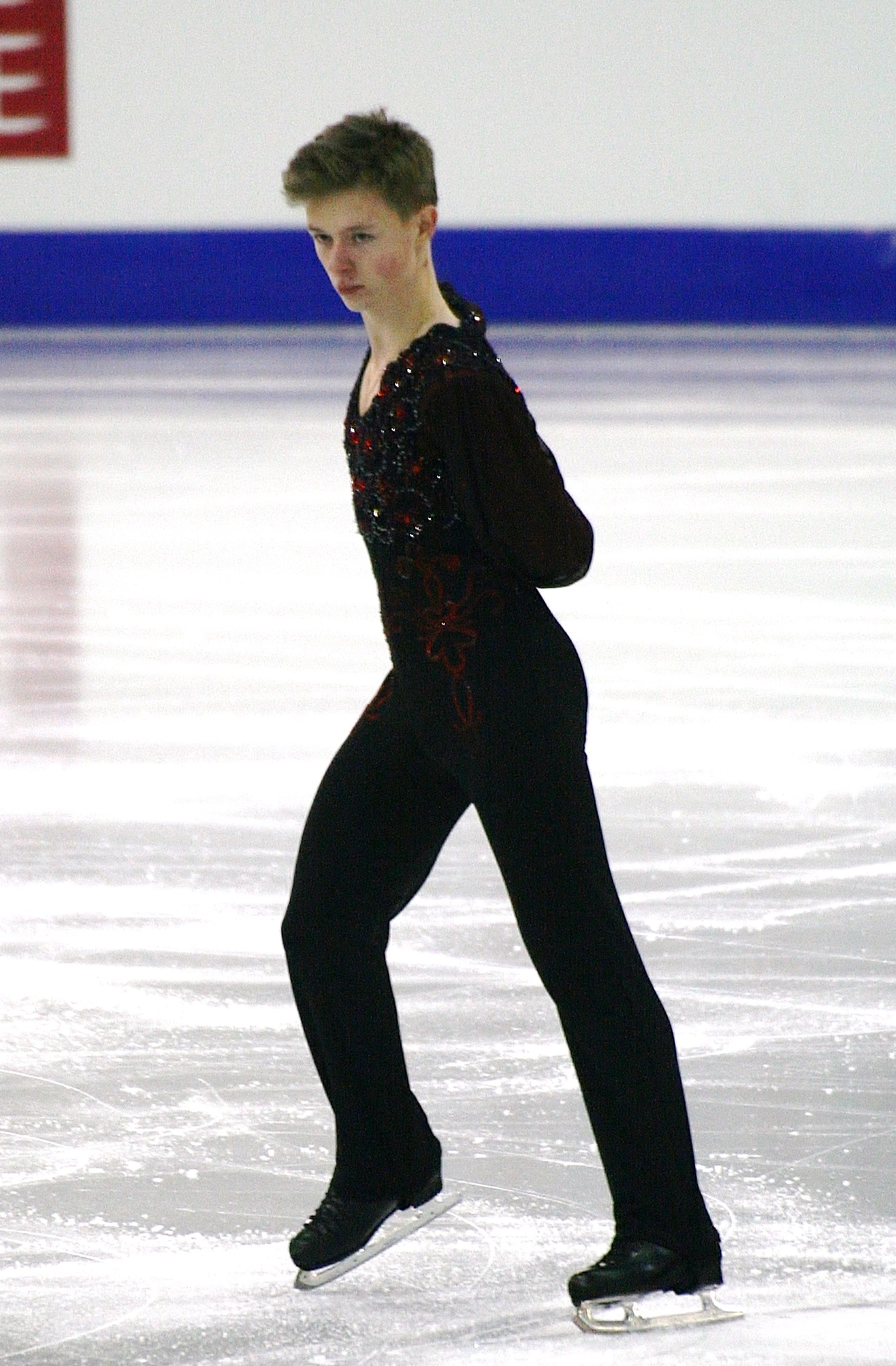 Александр Петров (Россия) на финале Гран-при среди юниоров 2014-2015.